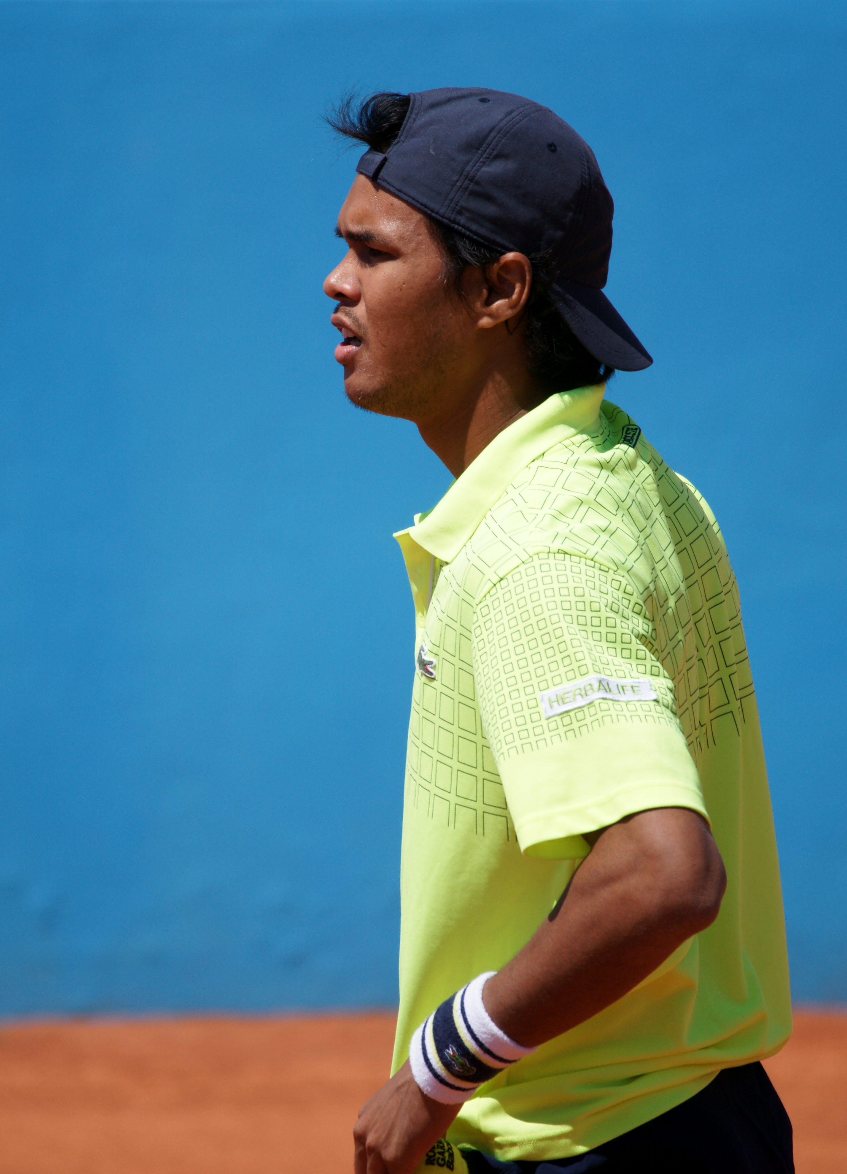 Somdev Devvarman Nice Open ATP 2014